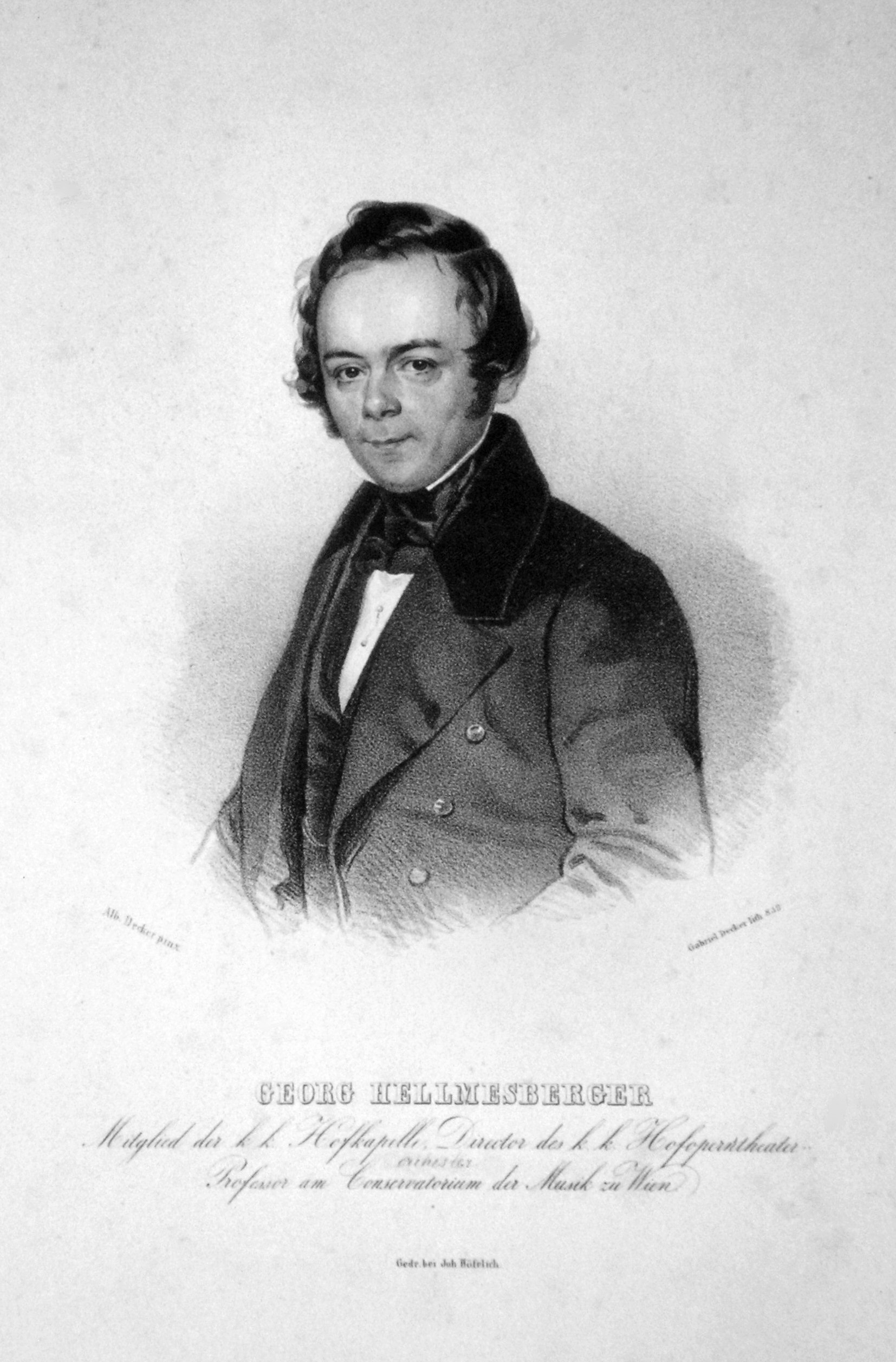 Georg Hellmesberger Senior (1800-1873), österreichischer Violinist und Musikpädagoge. Lithographie von Gabriel Decker, 1839